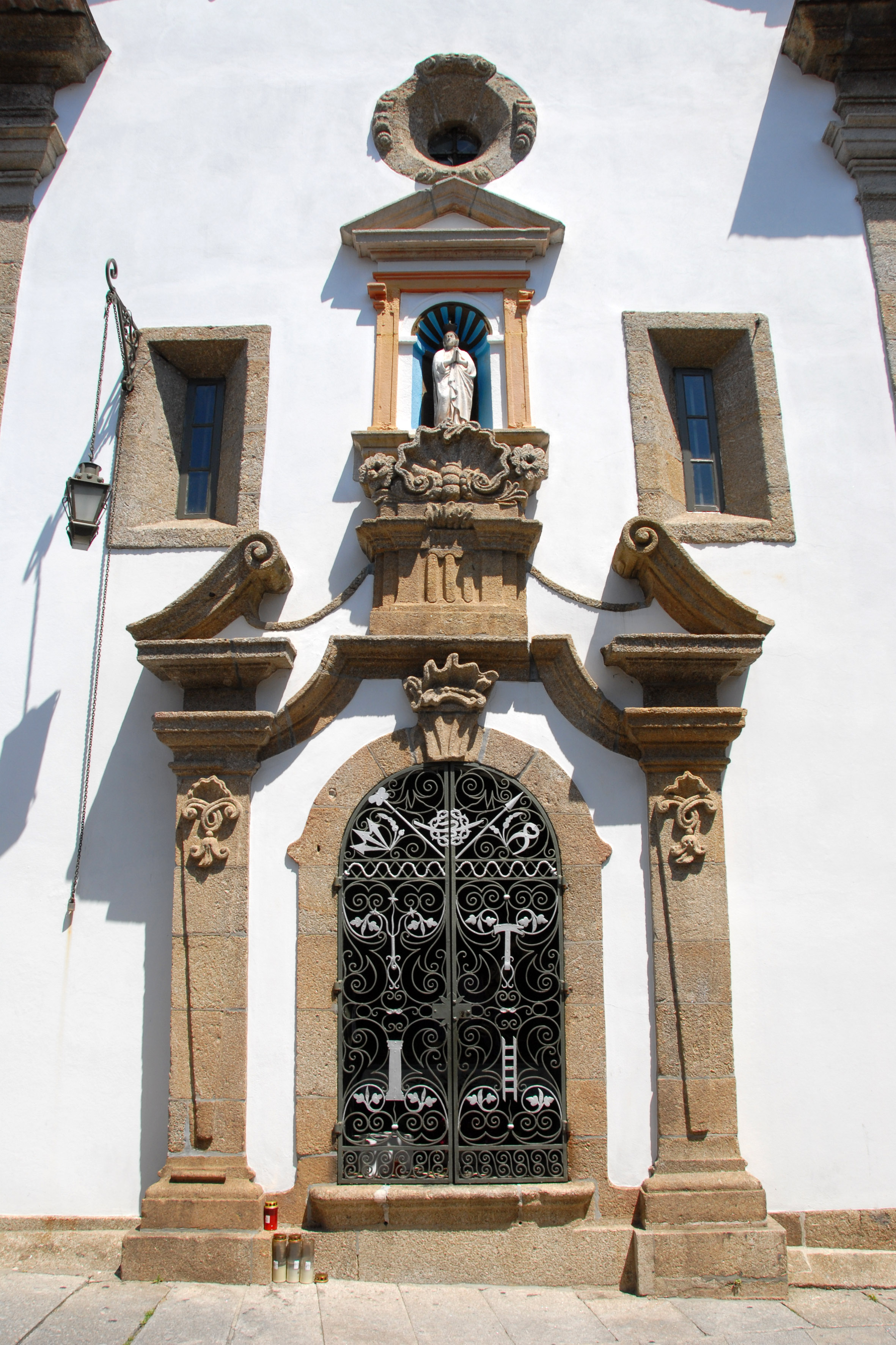 Penafiel - Igreja da Misericórdia de Penafiel This file was uploaded for Wiki Loves Monuments in Portugal with the unique identifier 72938.